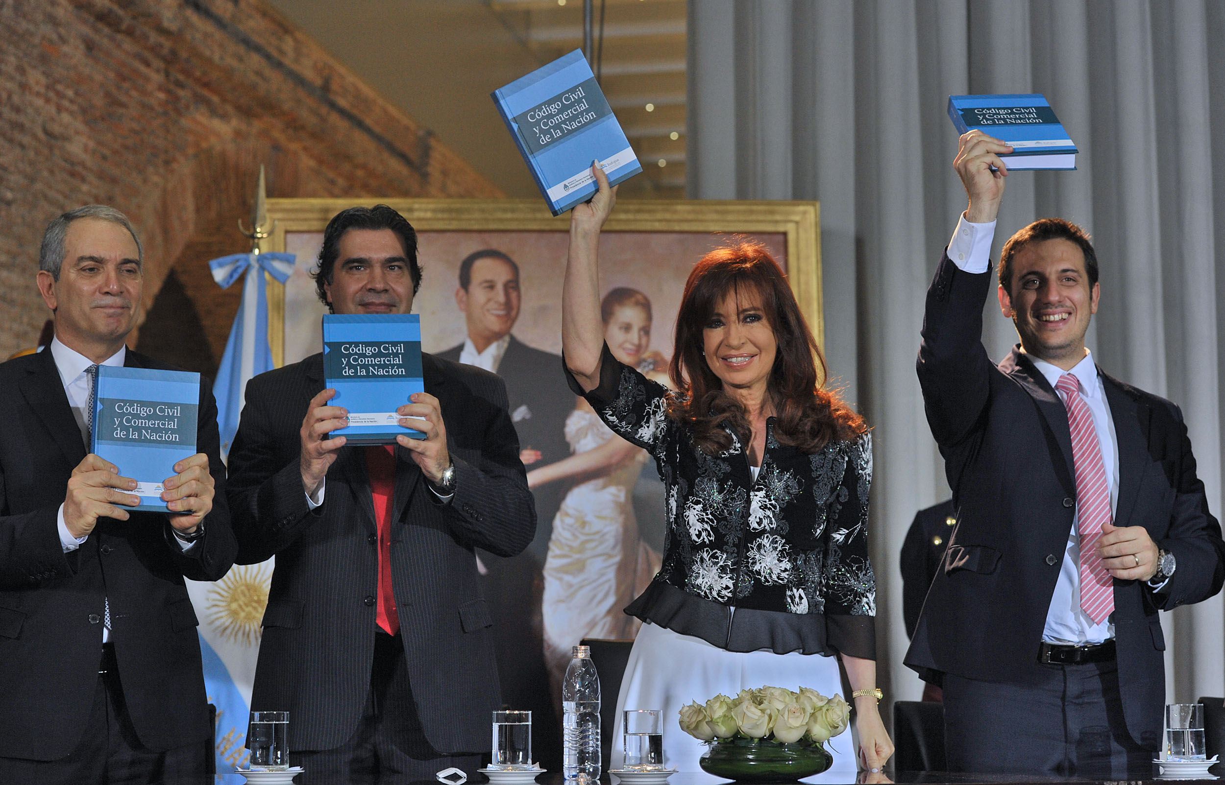 La presidenta Cristina Fernández de Kirchner destacó que “no hubo un proyecto que haya tenido un tratamiento tan democrático en la historia argentina”, en referencia al nuevo Código Civil que promulgó esta tarde durante un acto que se desarrolló en el Museo del Bicentenario de la Casa Rosada.